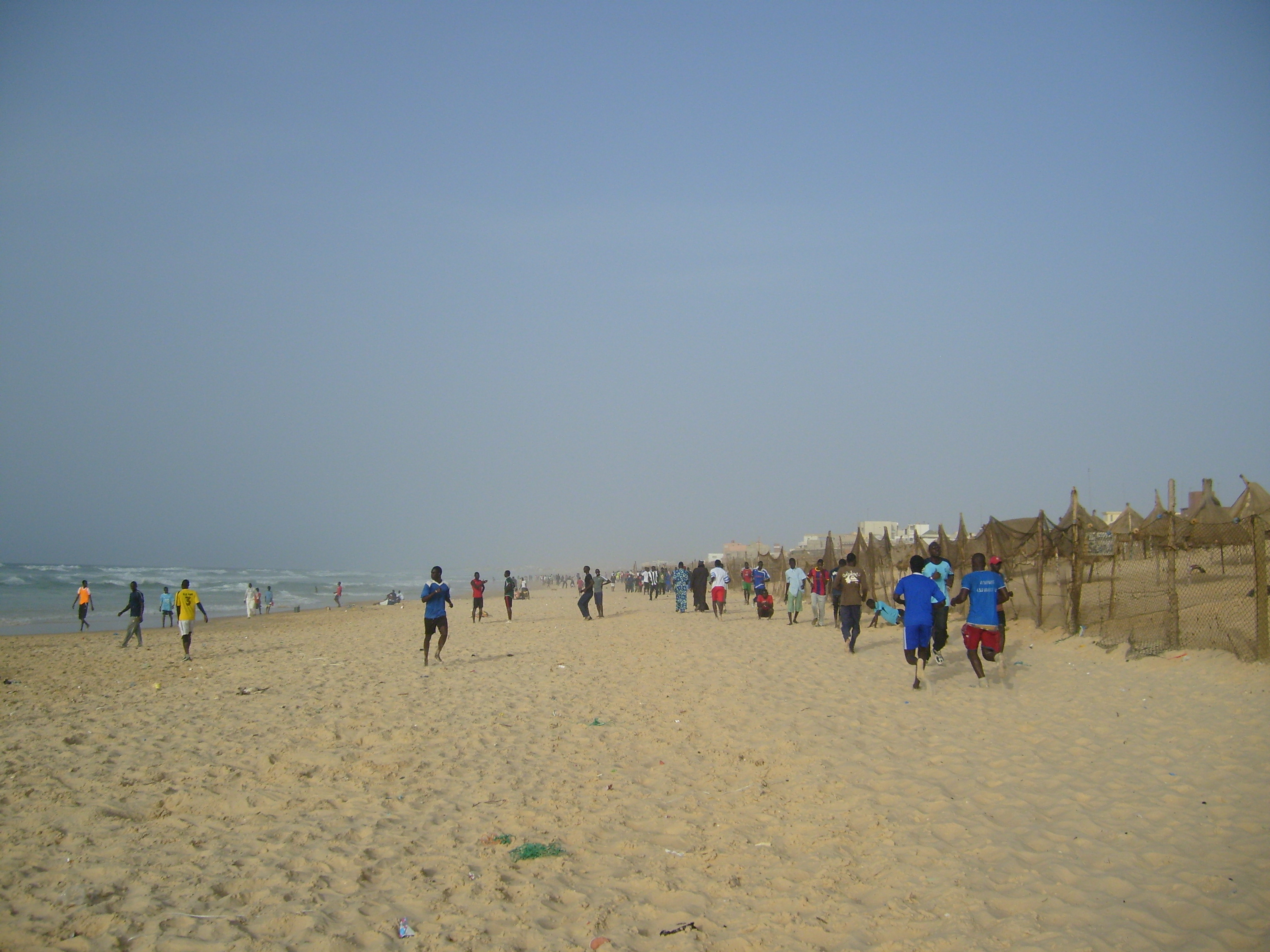 Dakar spiaggia;ragazzi che praticano sport.